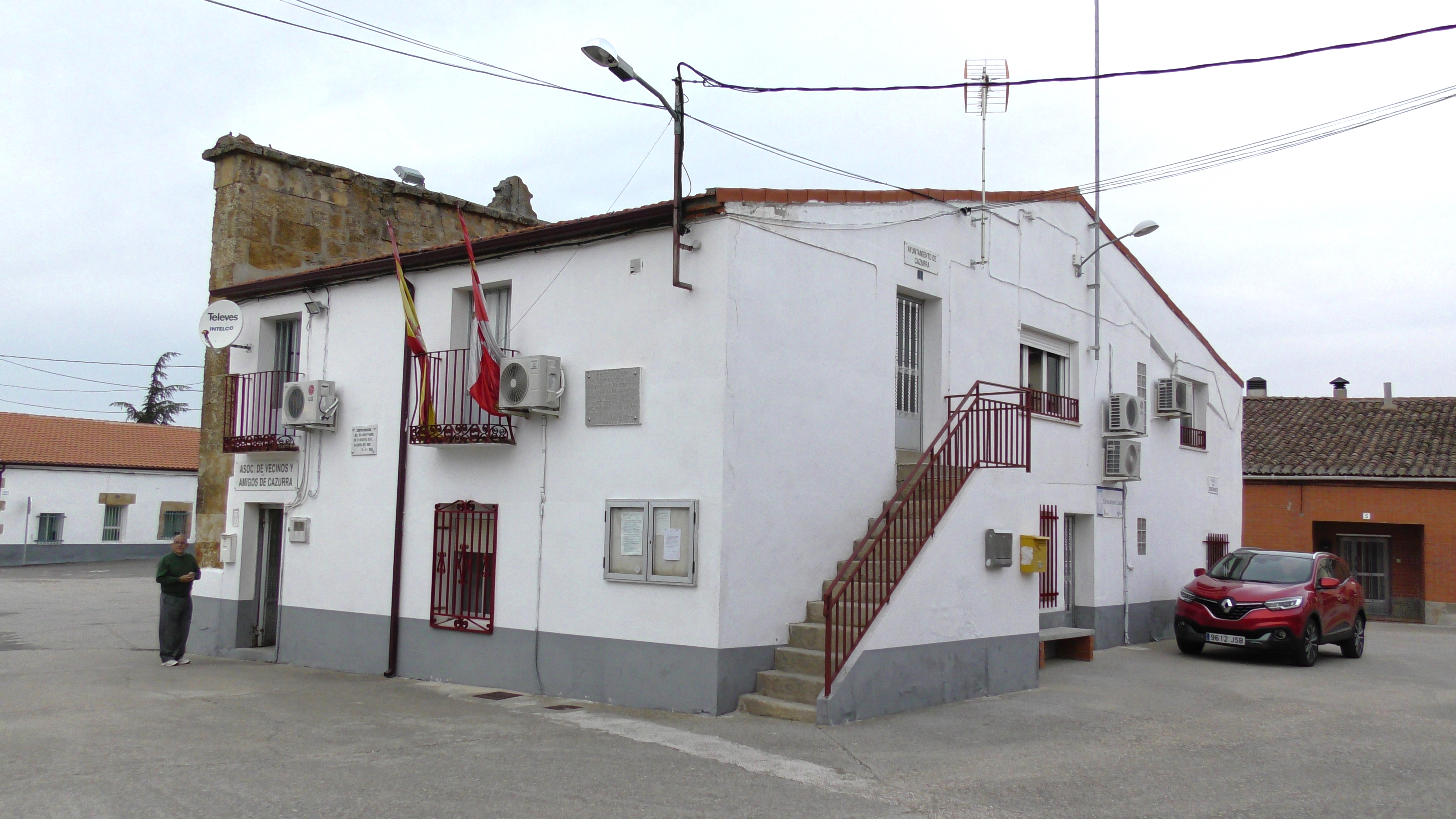 Cazurra